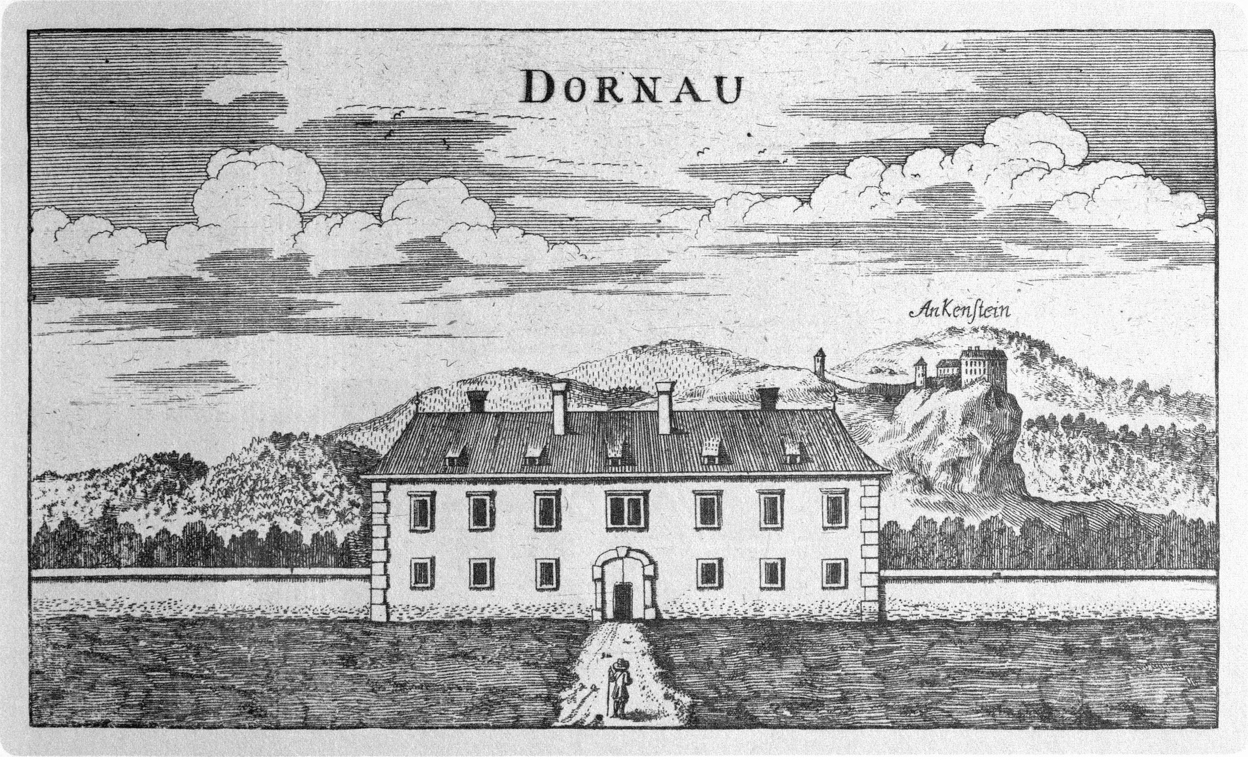 G. M. Vischers Käyserlichen Geographi, Topographia Ducatus Stiriae, Das ist: Eigentliche Delineation / und Abbildung aller Städte / Schlösser / Marcktfleck / Lustgärten / Probsteyen / Stiffter / Clöster und Kirchen / so es sich im Herzogthumb Steyrmarck befinden; Und anjetzo Umb einen billichen Preyß zu finden seynd Bey Johann Bitsch Universitäts Buchhandlern / Auff dem Juden=Platz bey der guldenen Saulen. Graz 1681 Die Nummerierung der Dateien folgt der alphabetischen Reihung der Orte